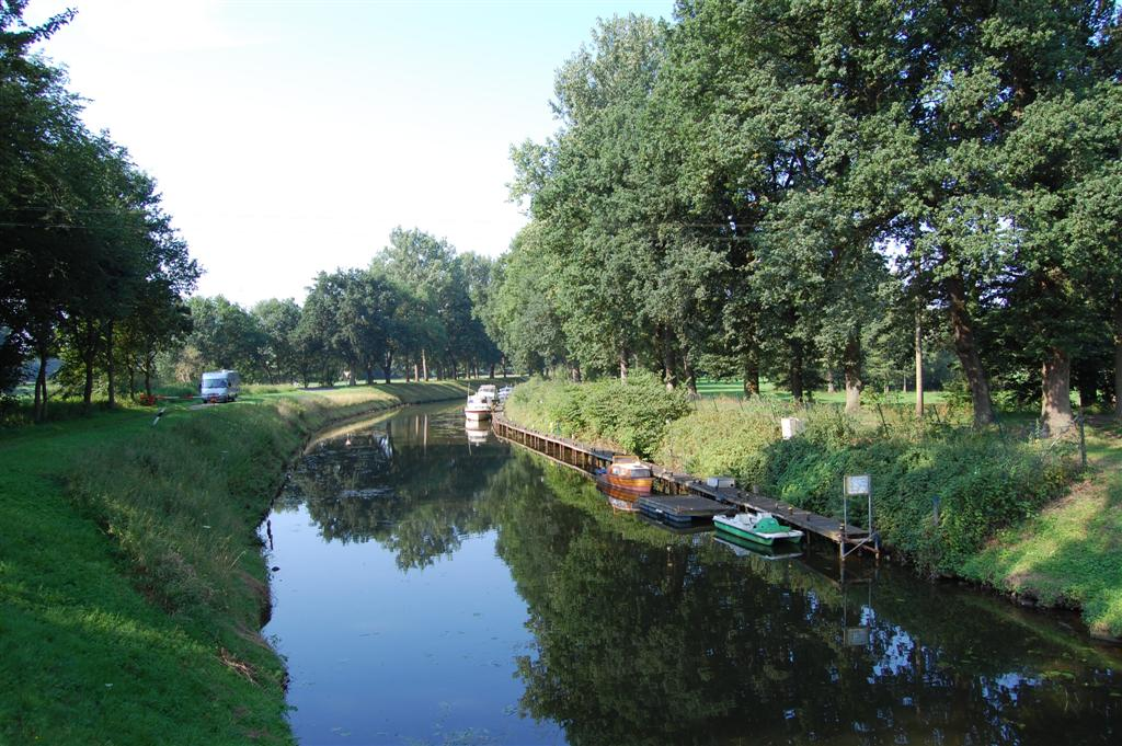 Het Ems-Vechte-Kanal wat geopend werd in Juli 1879 en naast de funktie voor het watertransport, diende tevens als afwateringskanaal voor de veengebieden in de omgeving.